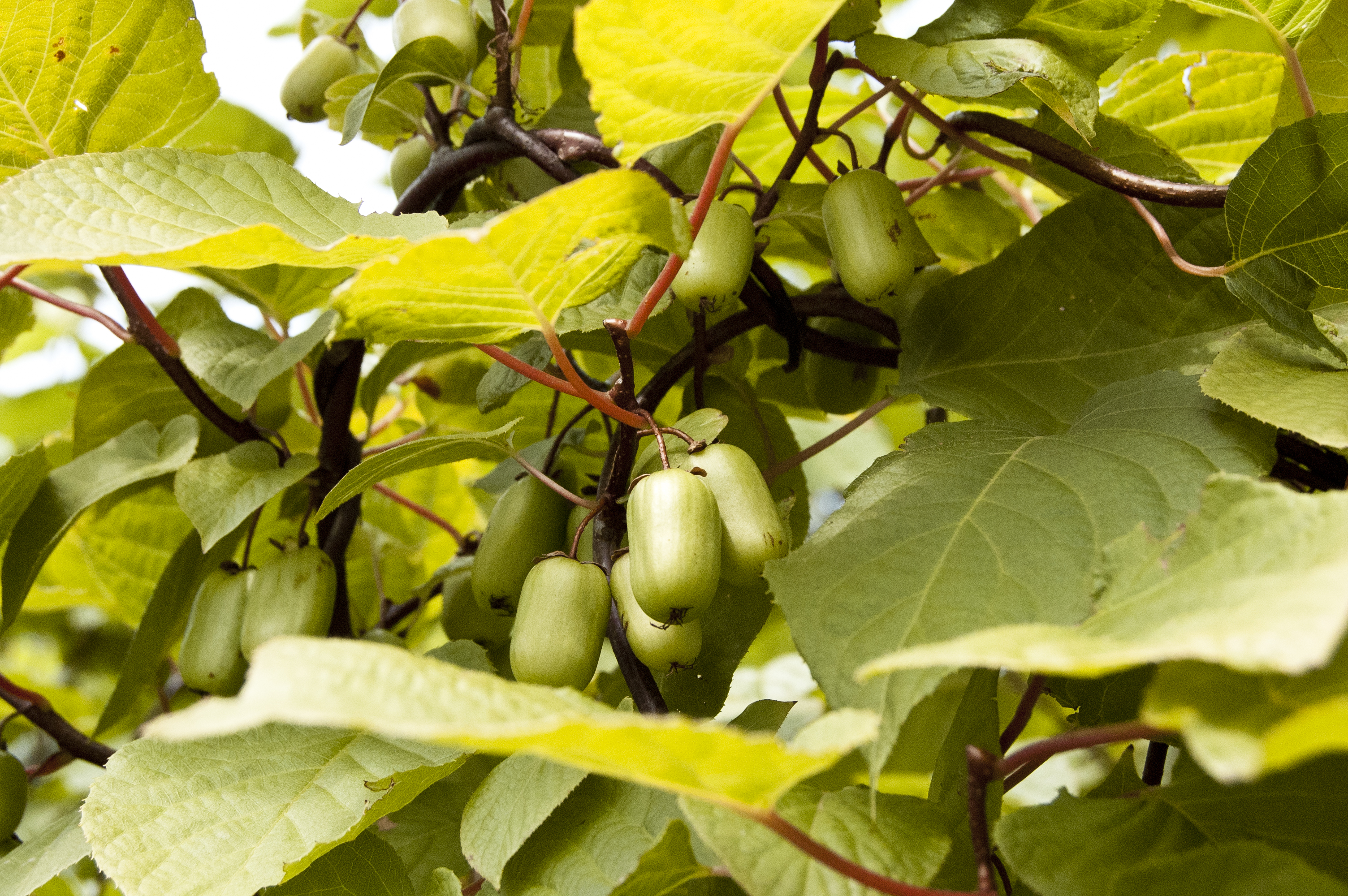 Kiwis arctiques (Actinidia kolomikta) du Jardin de la Paix de l'école primaire Louis-Colin à Montréal, Québec, Canada